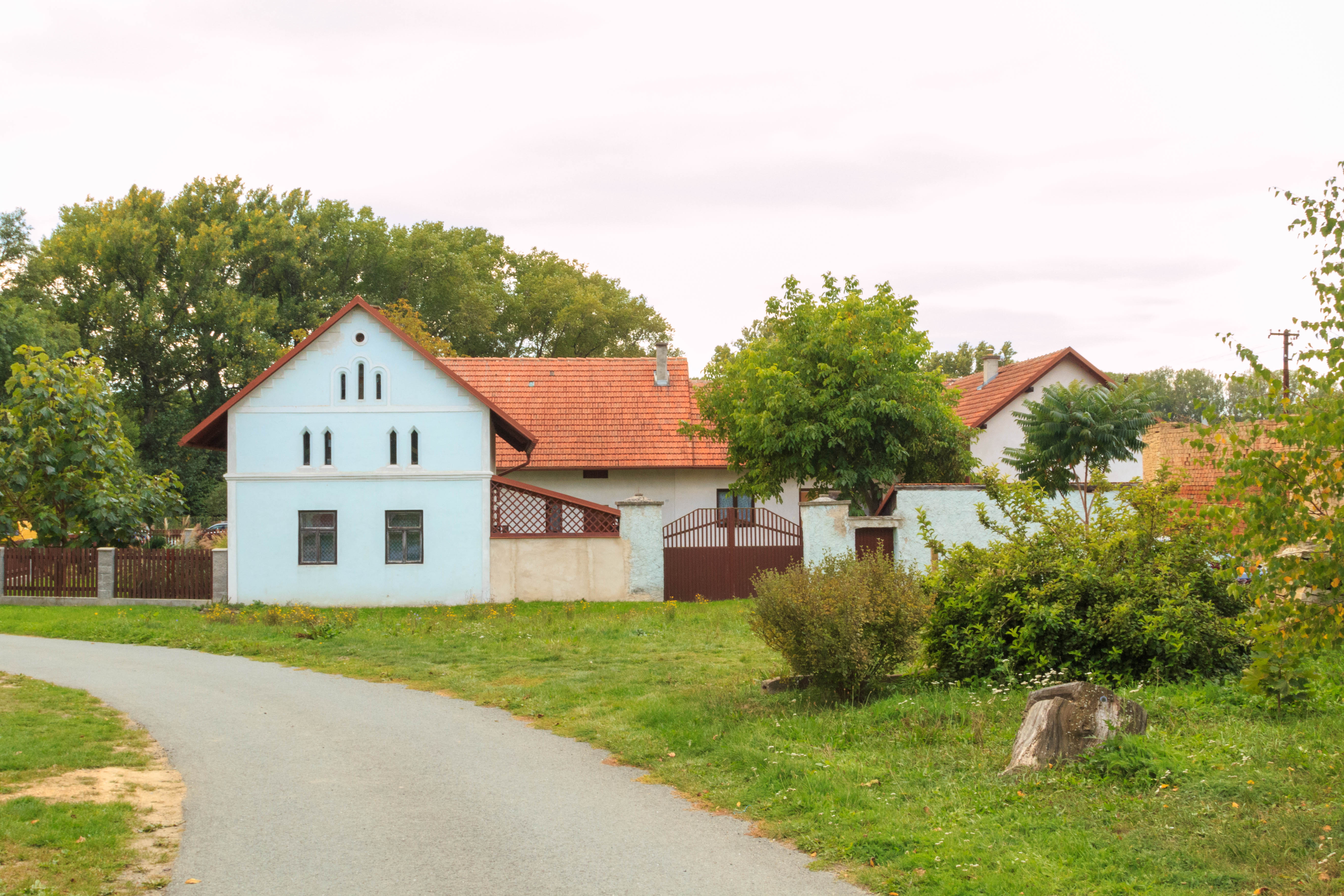 Poděčely čp. 16